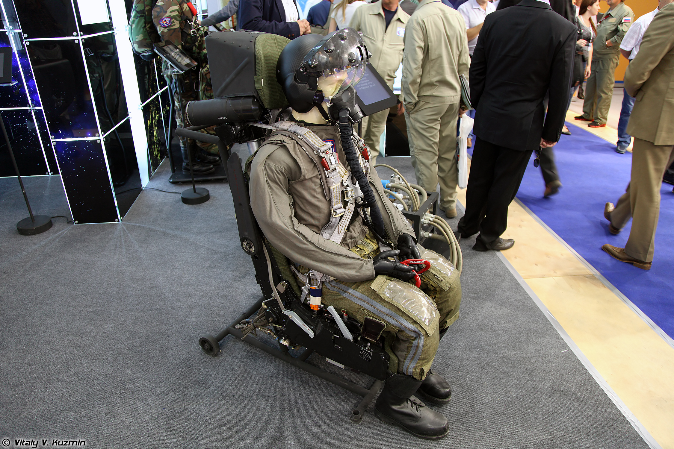 Катапультное кресло К-36Д-5 (K-36D-5 ejection seat)